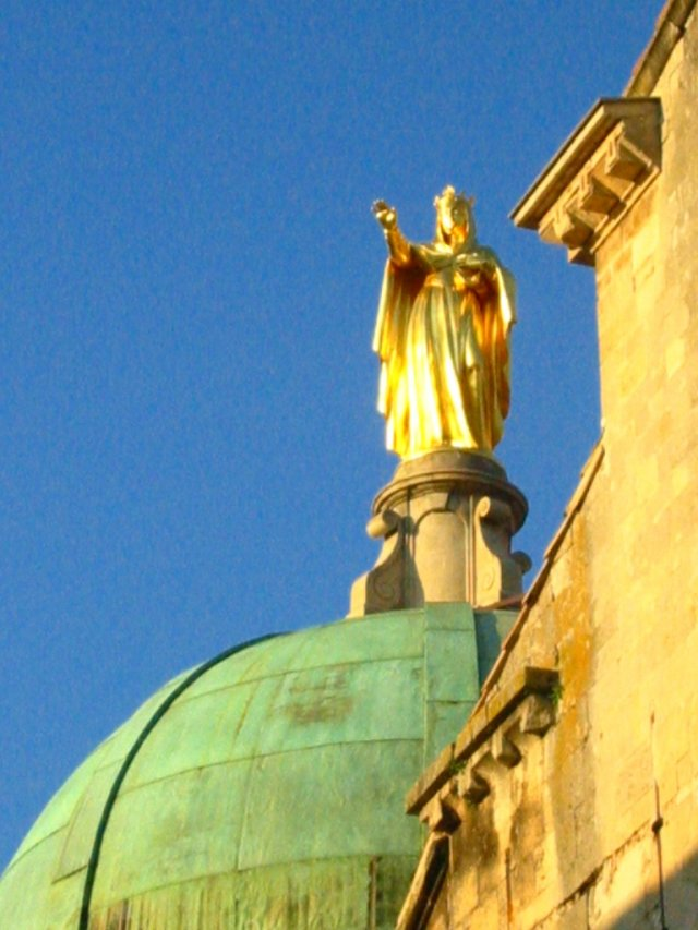 Dome de la Cathédrale Sainte-Anne d'Apt